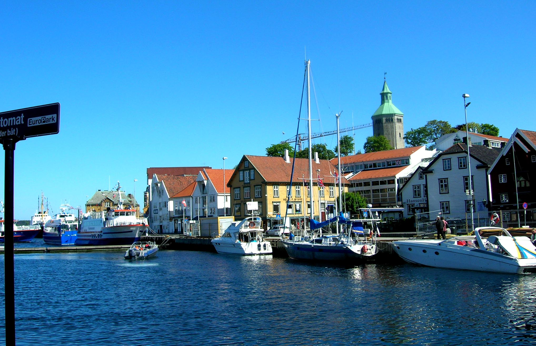 Hafen vu Stavanger (2006)